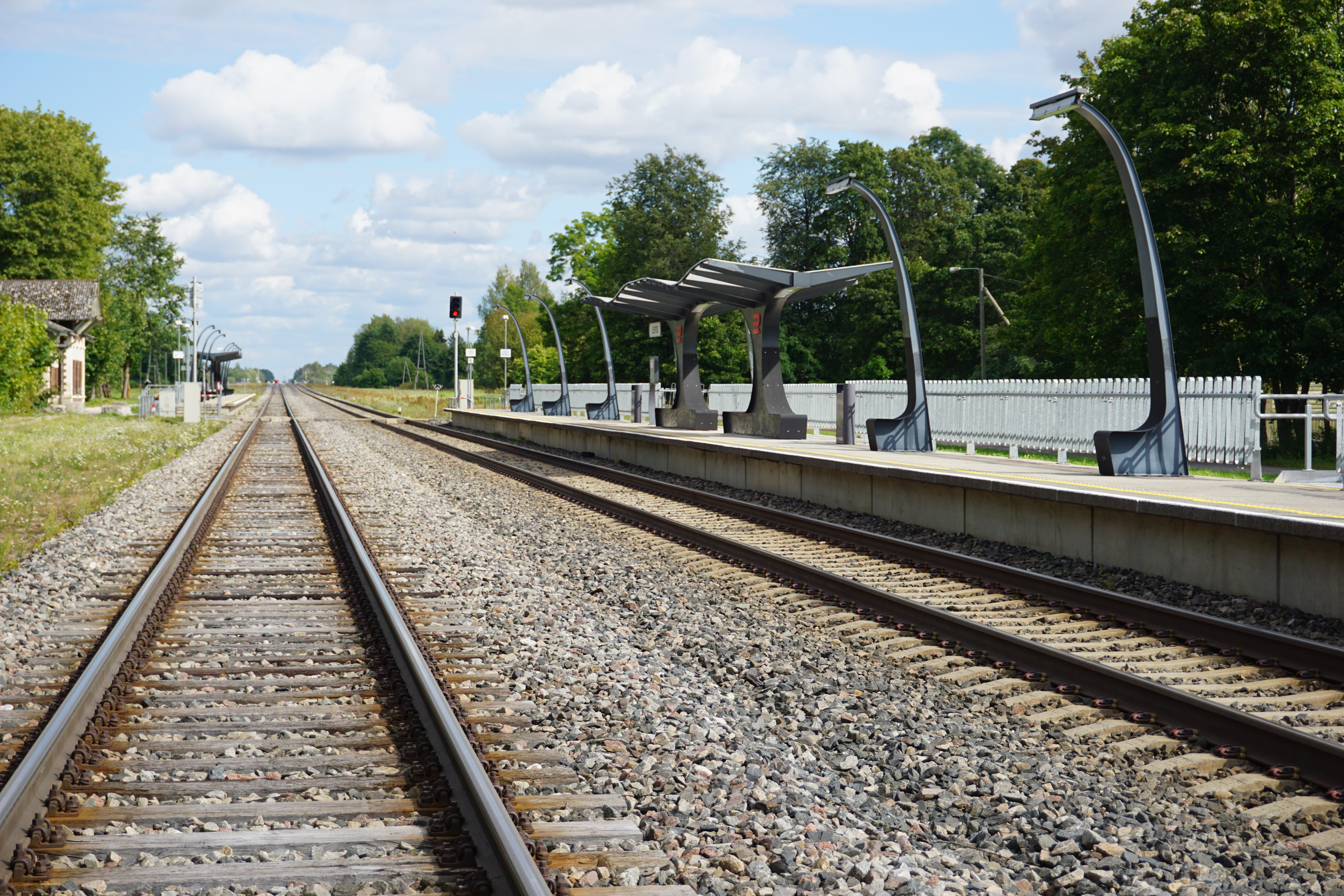 Perroonid Lehtses